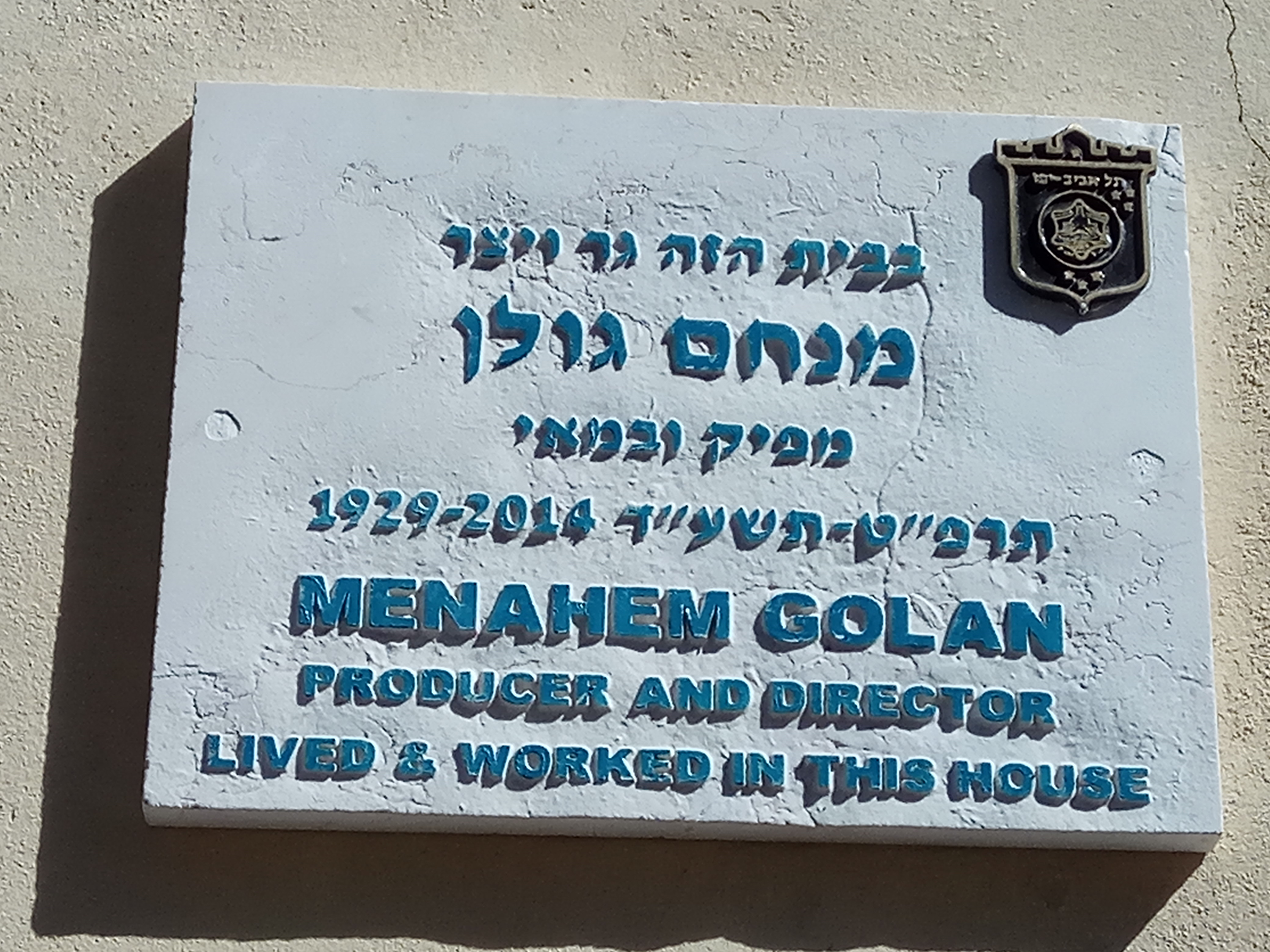 לוחית זיכרון למנחם גולן ברחוב רבי חנינא 25 בתל אביב (יפו)